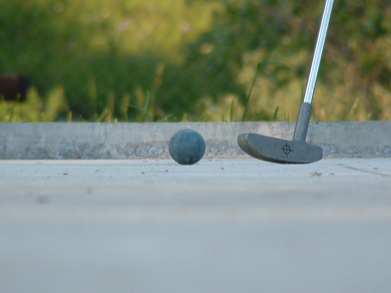 Minigolf